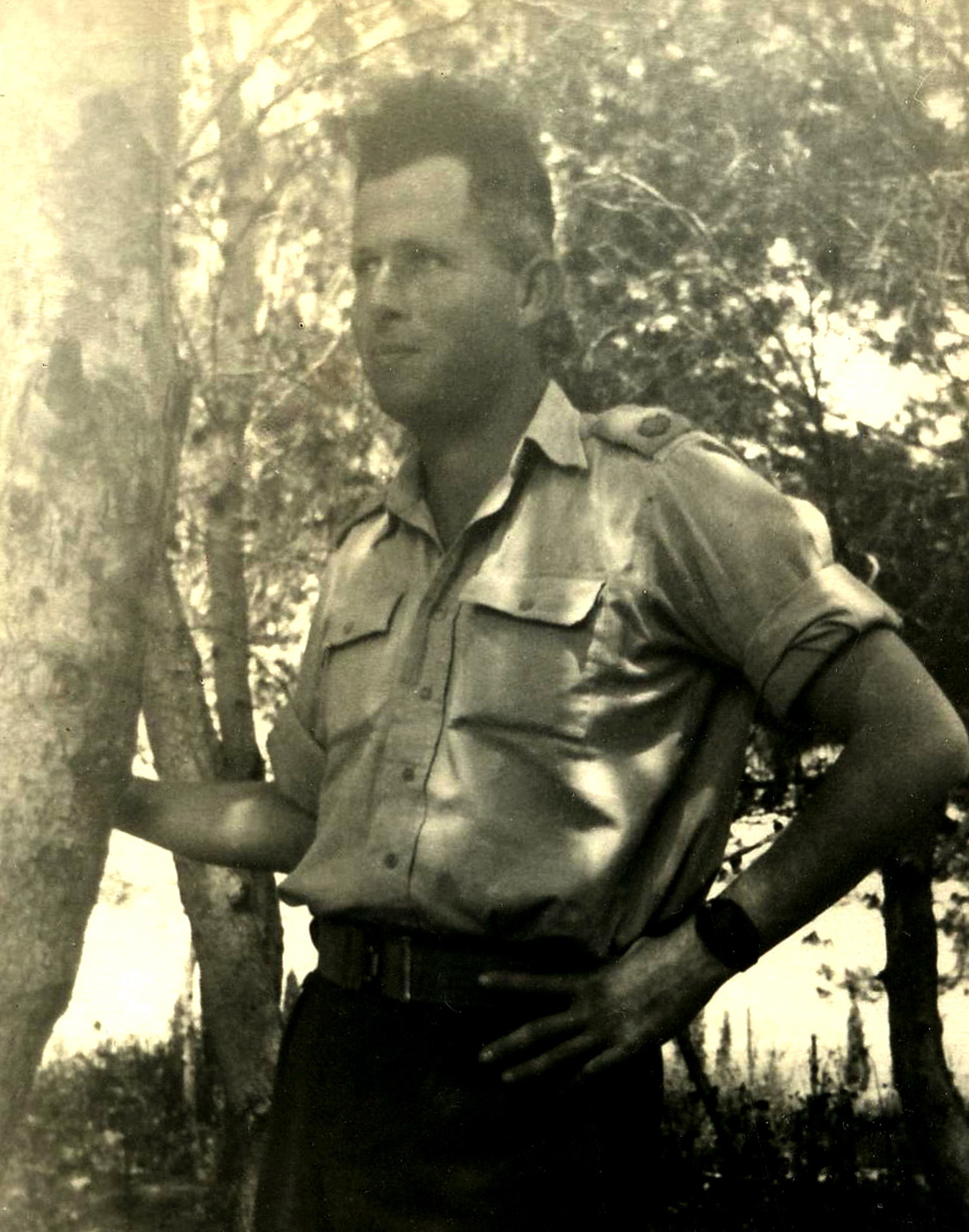 אסף שמחוני כמפקד הגדוד הראשון של חטיבת פלמ"ח יפתח, 1948